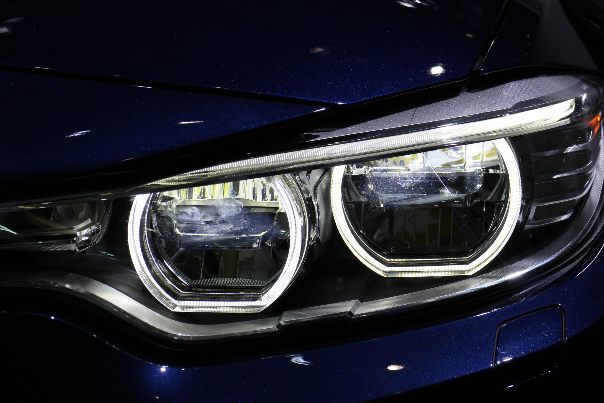 IAA 2013